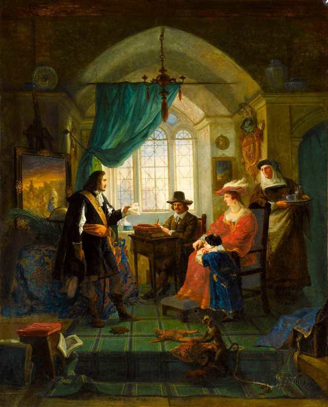 Rembrandt dans son atelier